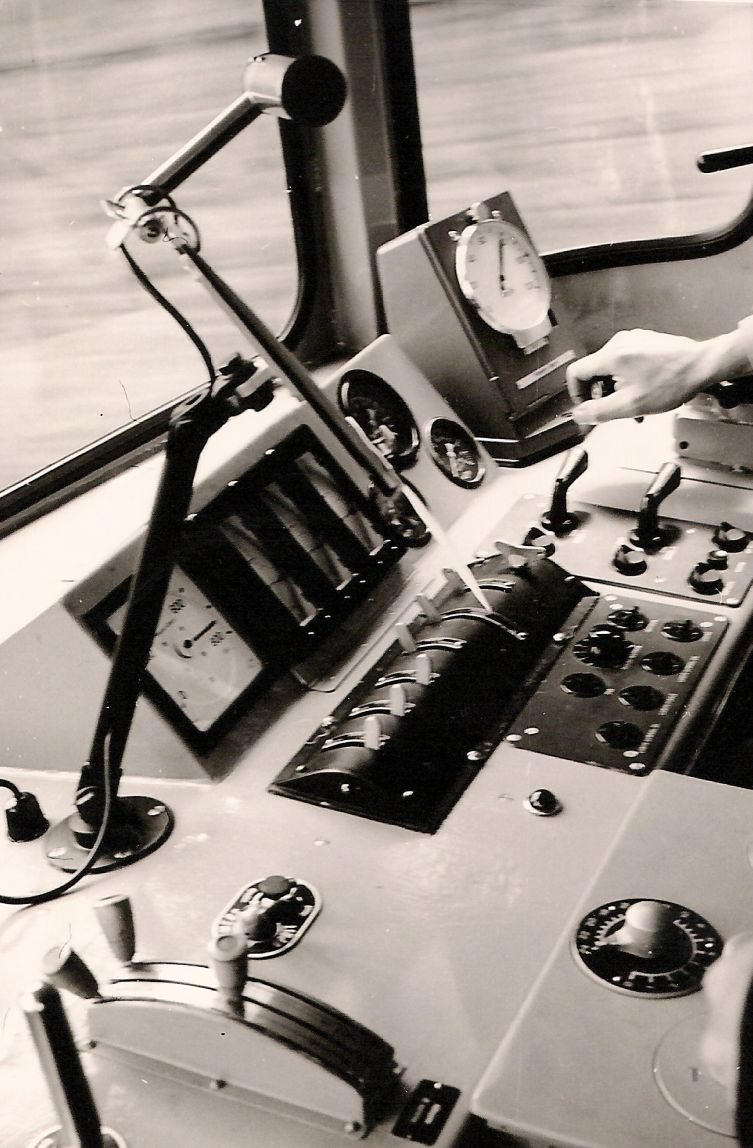 Fahrpult der CFR-Diesellok 060 DA 001